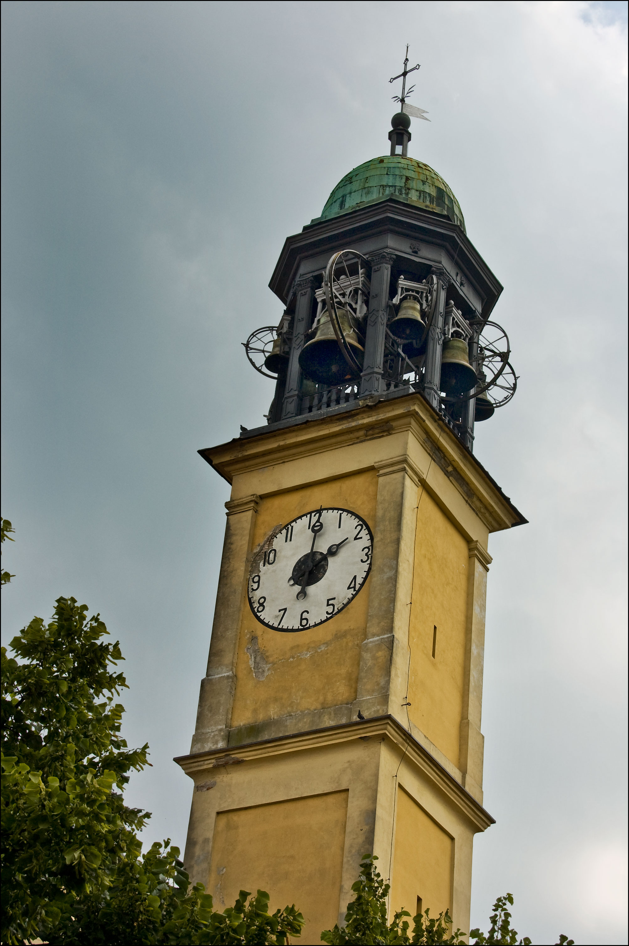 Il campanile della chiesa di Santo Stefano di Rosate